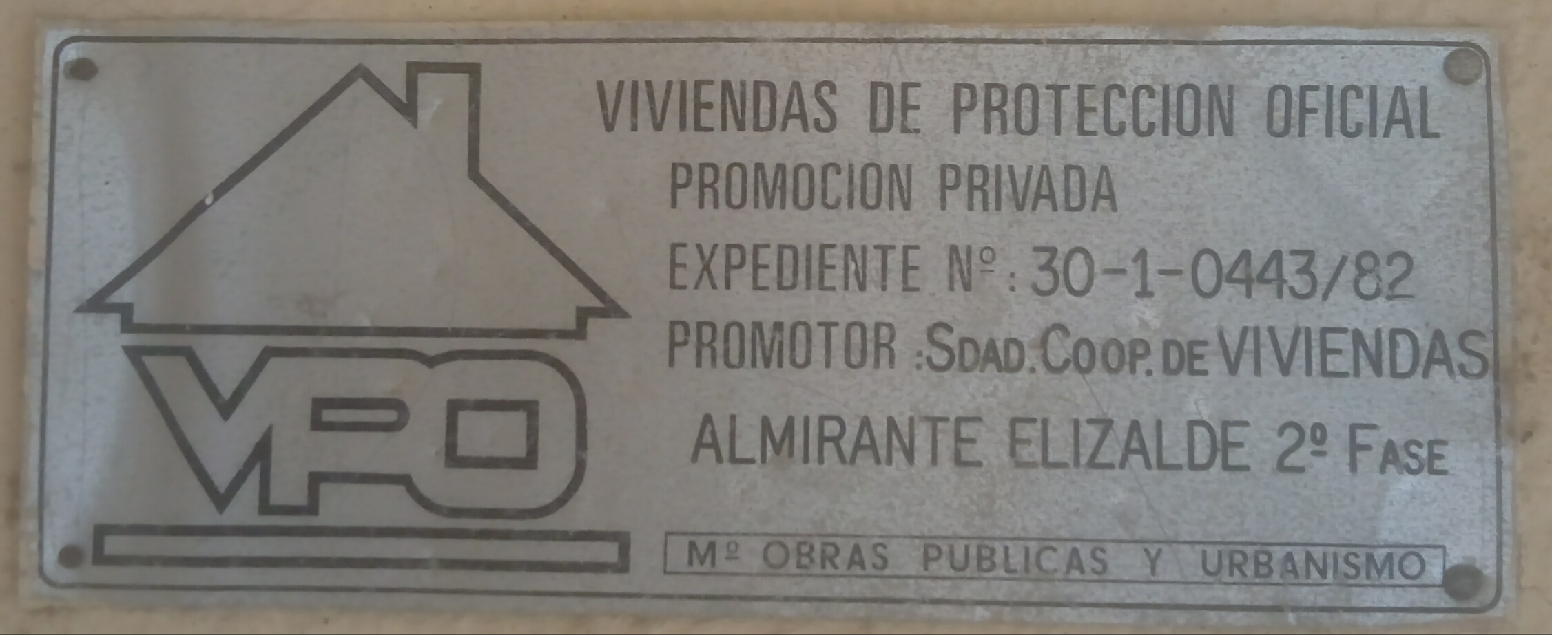 Placa VPO de la cooperativa Almirante Elizalde